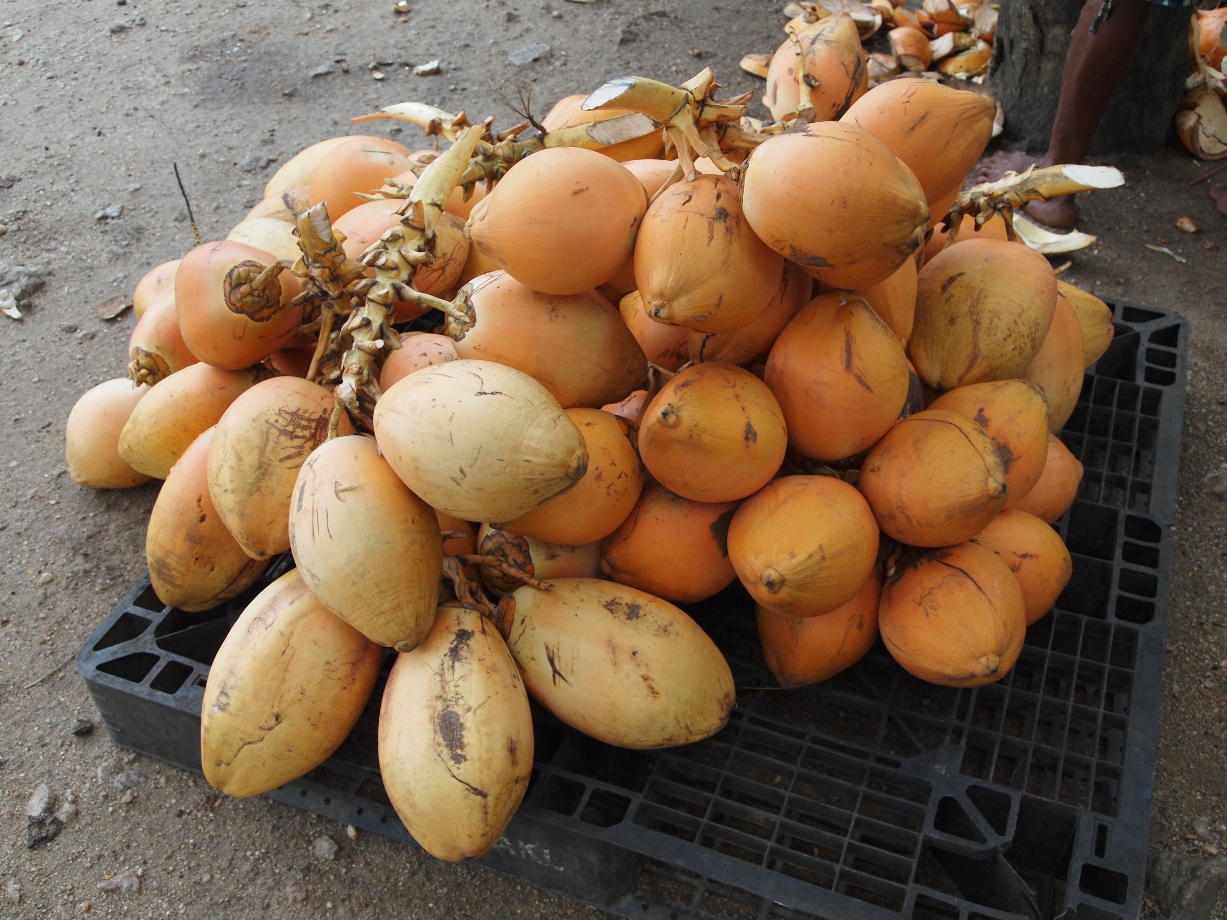 செவ்விளநீர்